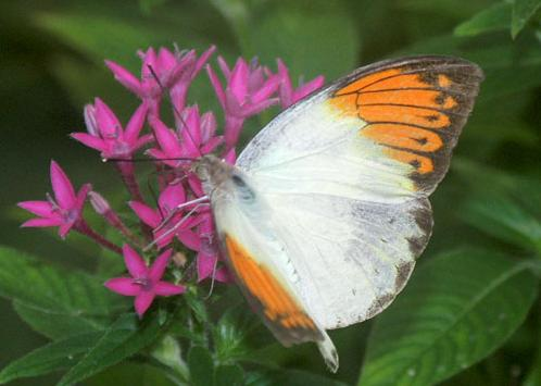 Papillon du parc floral d'Orléans-La Source Photographie prise par le propiétaire du site " ". CopyRight = GFDL